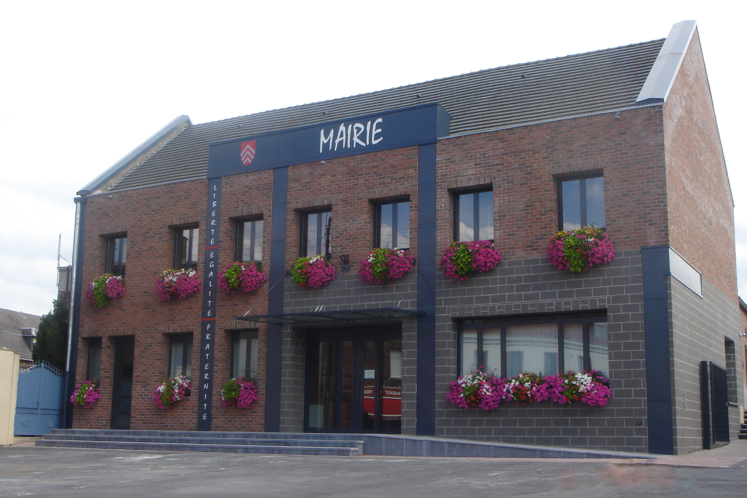 Mairie de Monchecourt - département du Nord - France